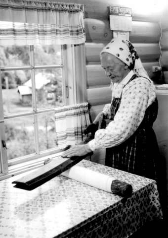 Olivia Dalen, Hol i Hallingdal viser bruk av mangletre i 1962.